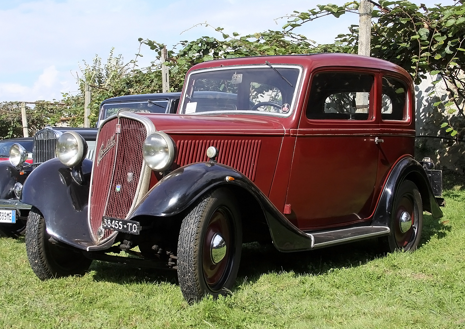 Fiat 508 Balilla